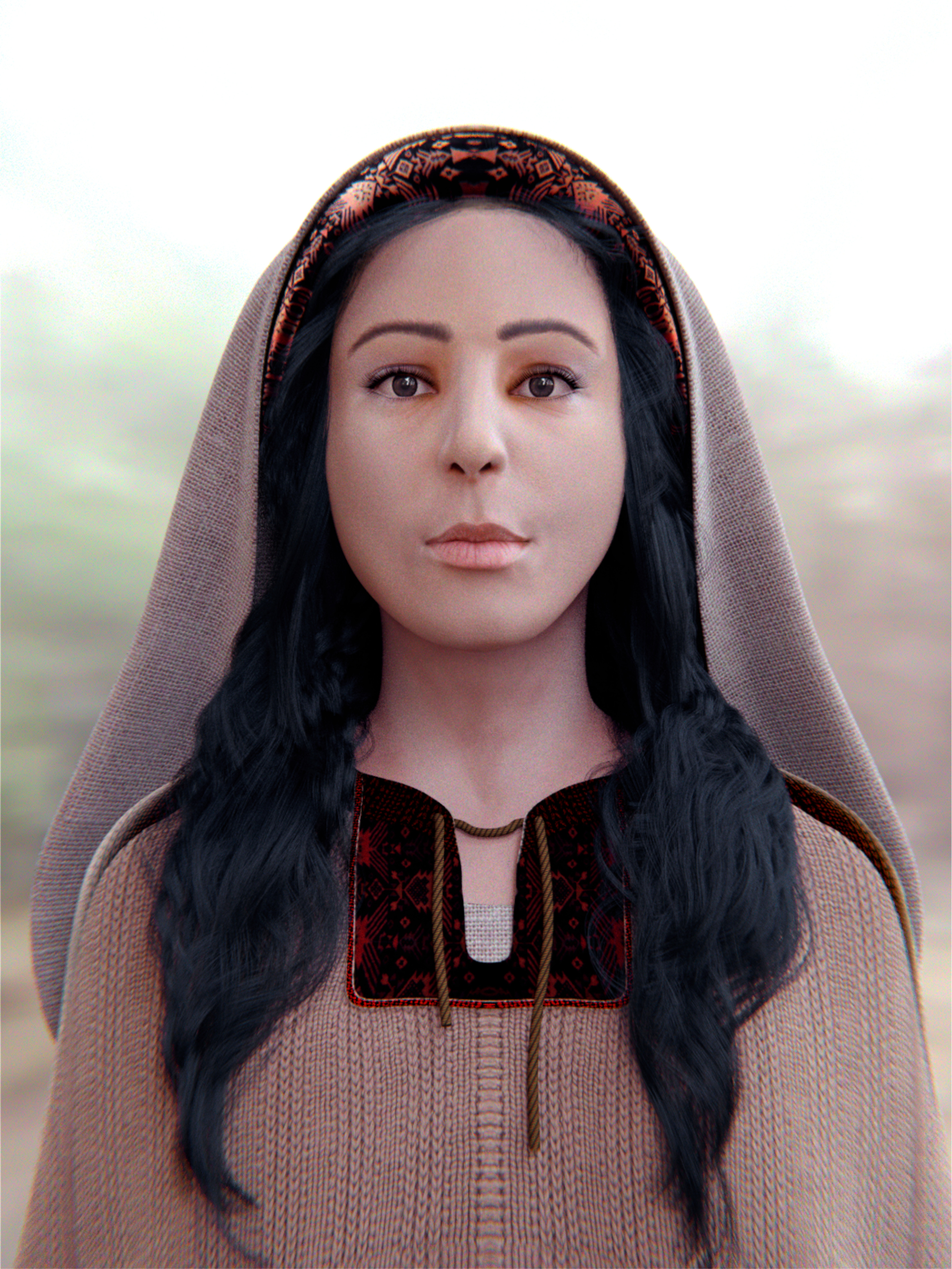 Face de Santa Maria Madalena, reconstruída a partir de um crânio presente na Basílica de Santa Maria Madalena na cidade de Saint-Maximin-La-Sainte-Baume e que segundo a tradição da igreja católica do sul da França pertenceu à supracitada figura bíblica. Participaram do projeto: Cícero Moraes (3D designer), Dr. José Luís Lira (especialista em Hagiologia), Dr. Paulo Eduardo Miamoto Dias (especialista em Odontologia Legal) e o padre Florian Racine, pároco da basílica.